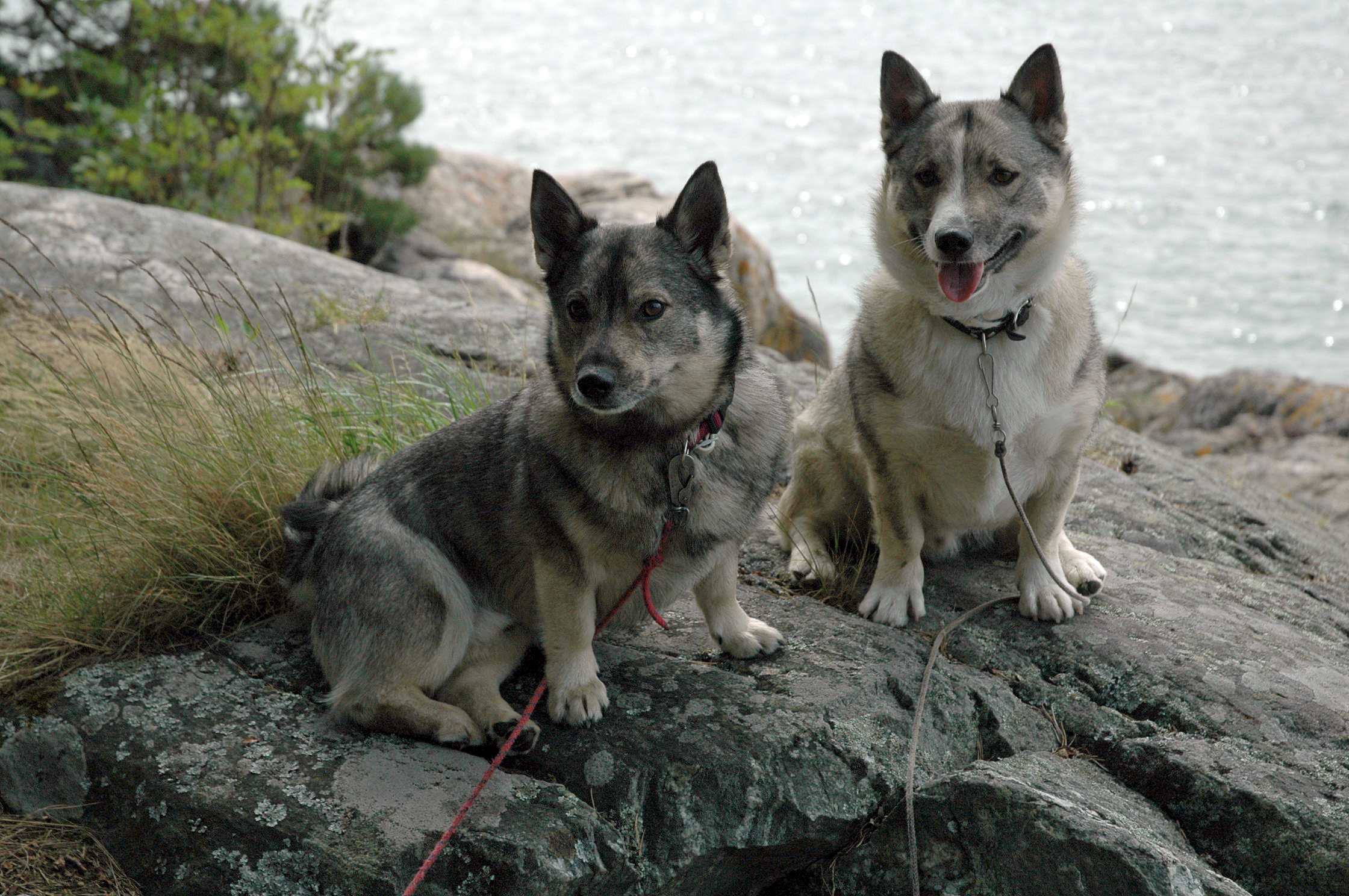 Västgötaspetsar